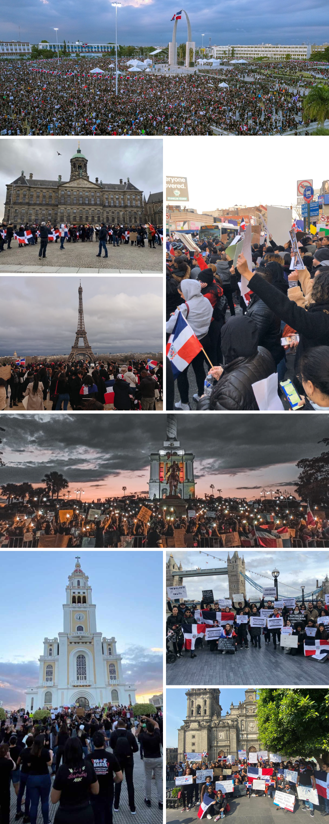 Fotografías representativas de las protestas dominicanas de 2020, nacionales e internacionales.